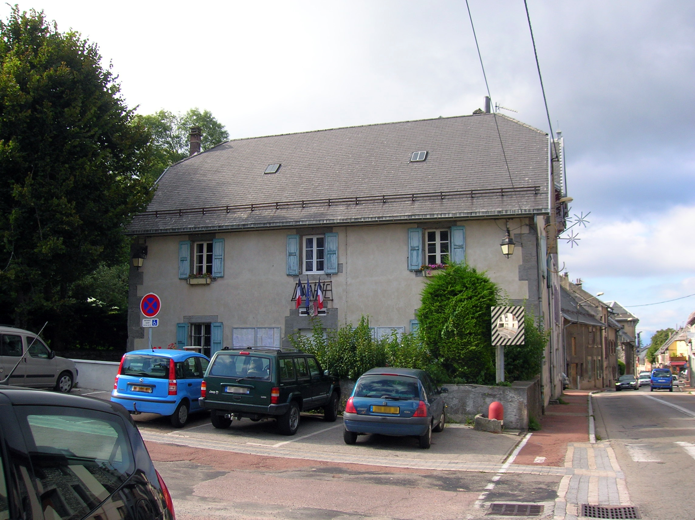 Laffrey, Isère, AuRA, France.